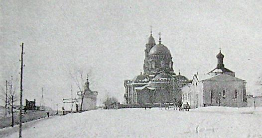 Старая (на пререднем плане) и новая Озерянская церковь на Холодной горе